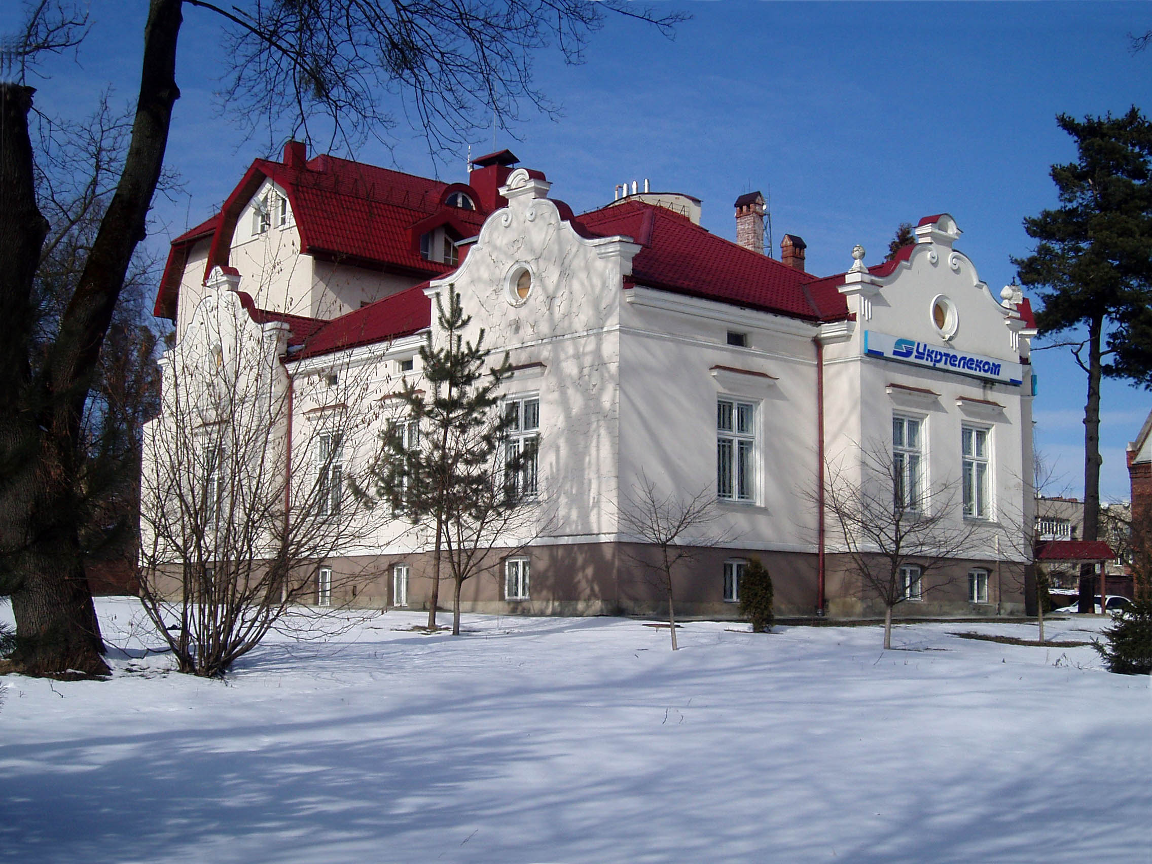 Дім № 72 на вулиці Генерала Чупринки у Львові. Збудований 1900 року за проектом Густава Бізанца (1848-1925).